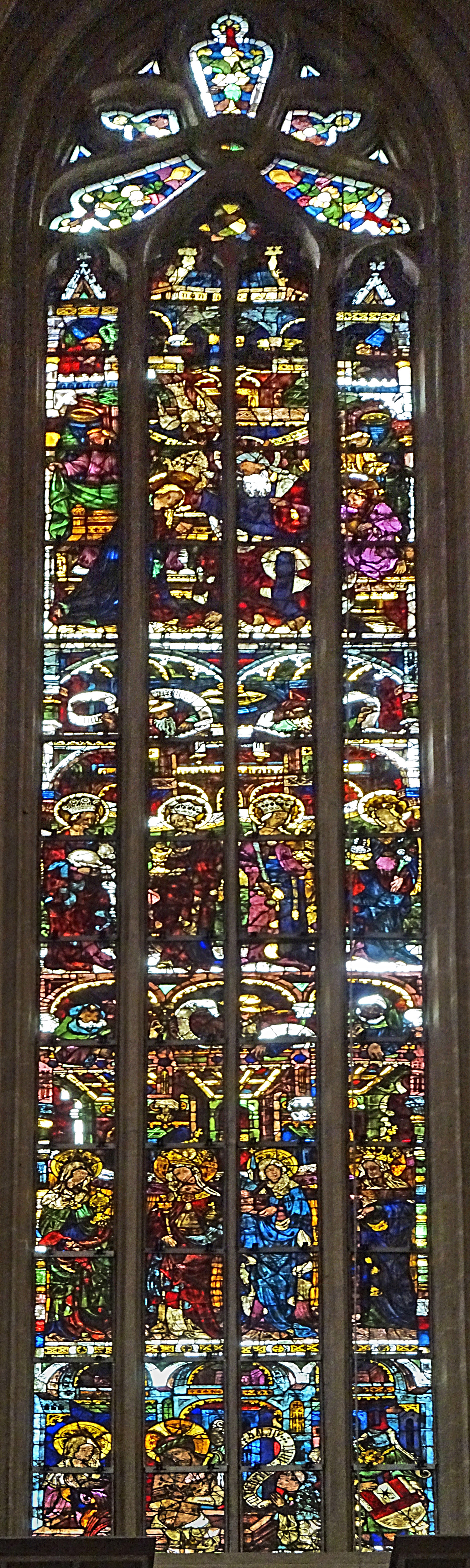 Tiefengrubenfenster (sVI) im Hohen Chor des Erfurter Doms St. Marien